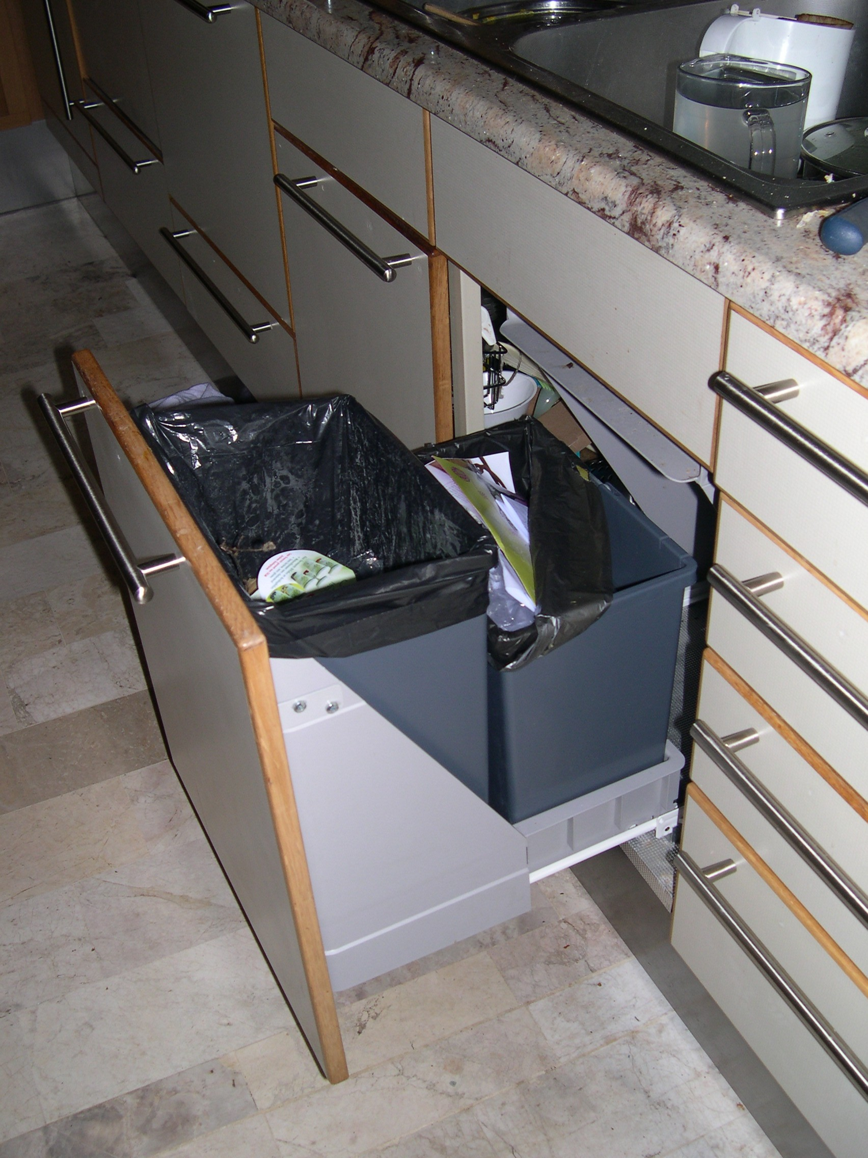 Mia kuireja rubujo